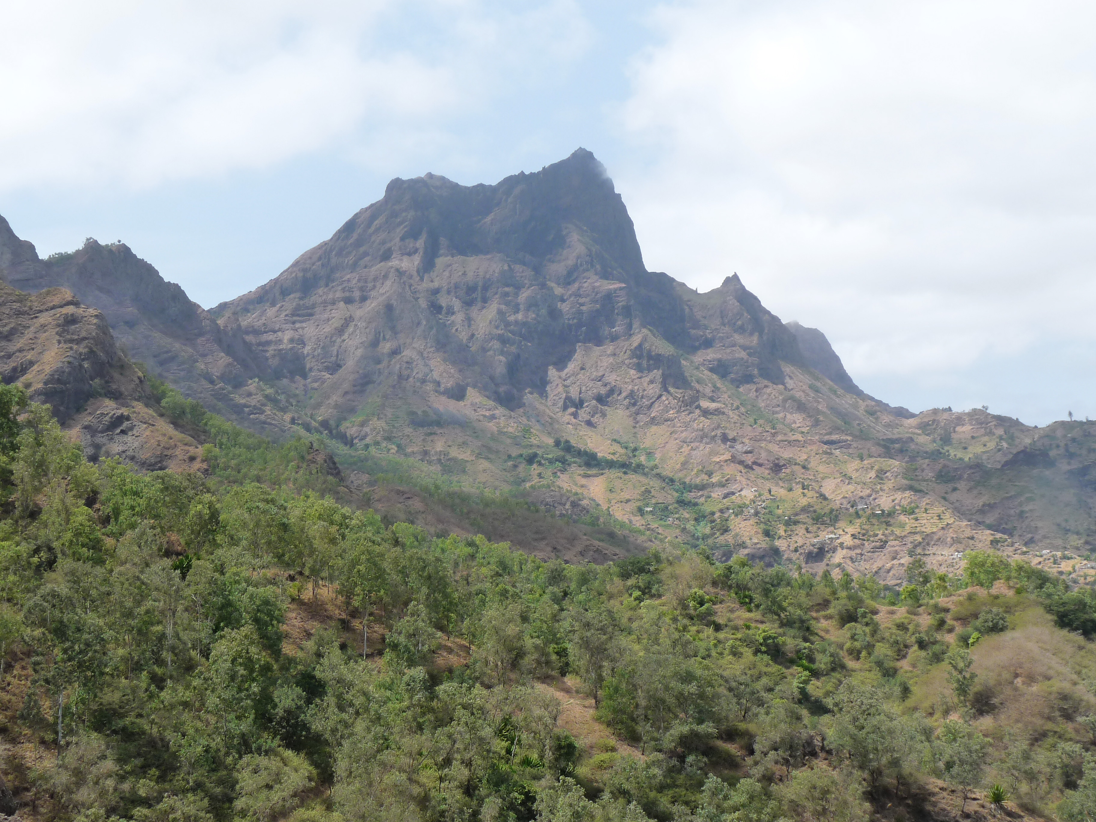 Sommet du Pico da Antónia (île de Santiago, Cap-Vert)